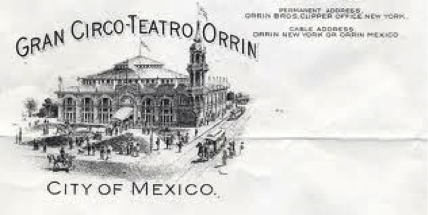 Imagen del circo de orrín en la ciudad de méxico